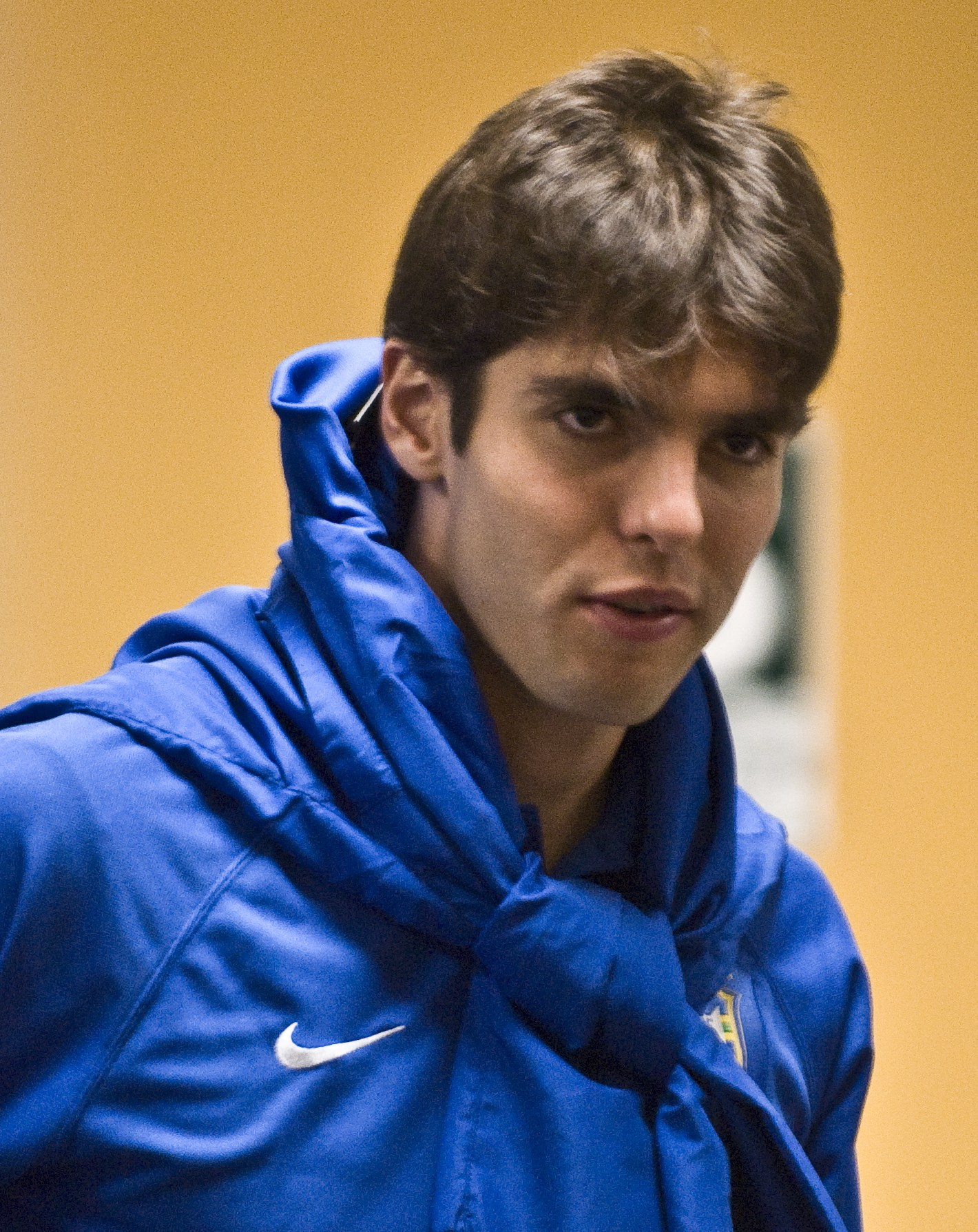 Kaká